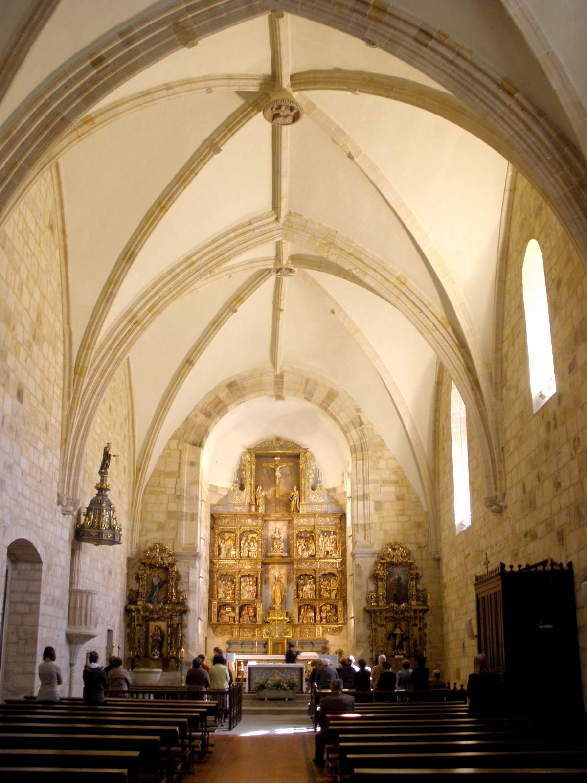 Iglesia de San Agustín de Etxebarria (Elorrio, Vizcaya)